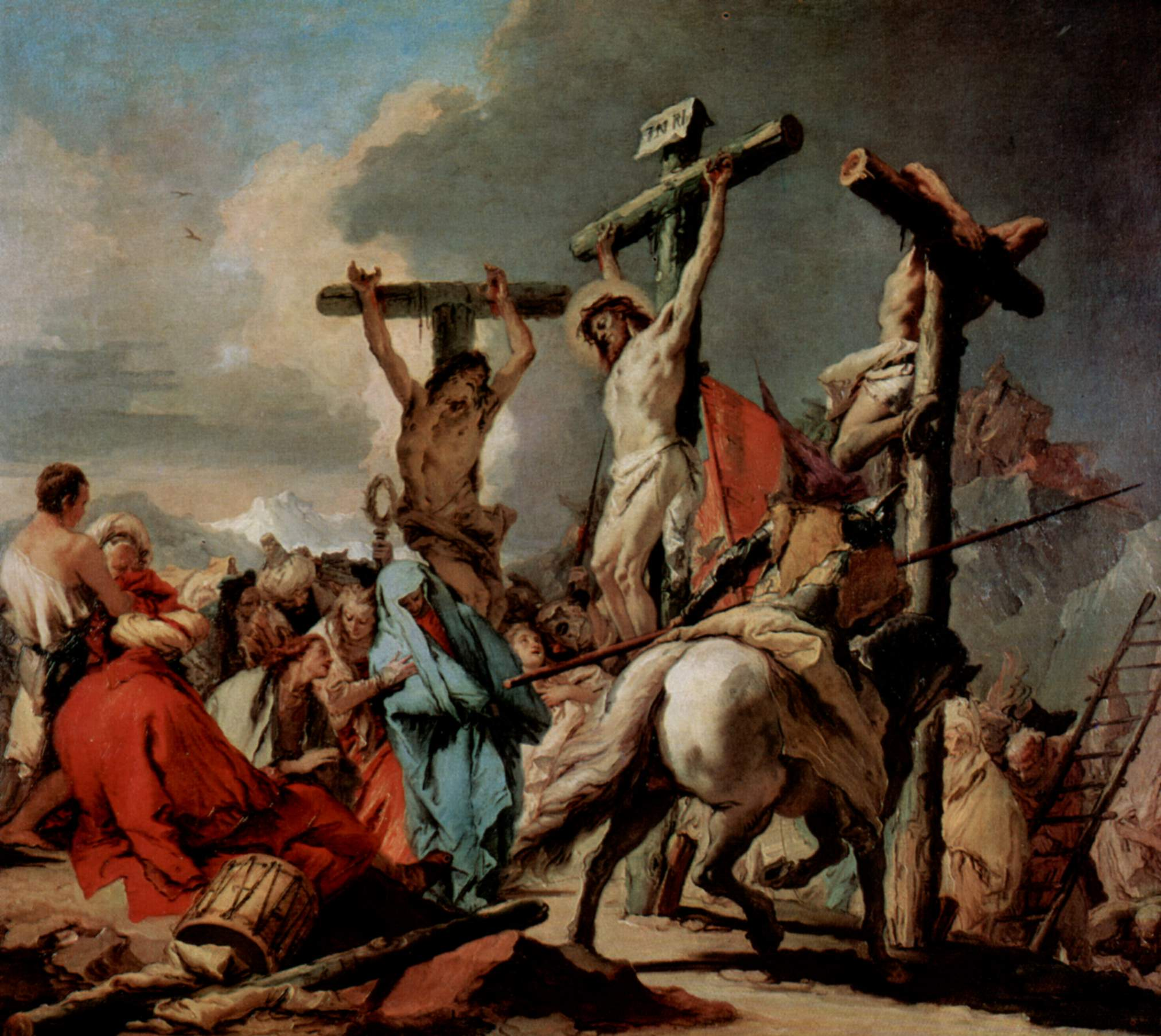 Crucifixion